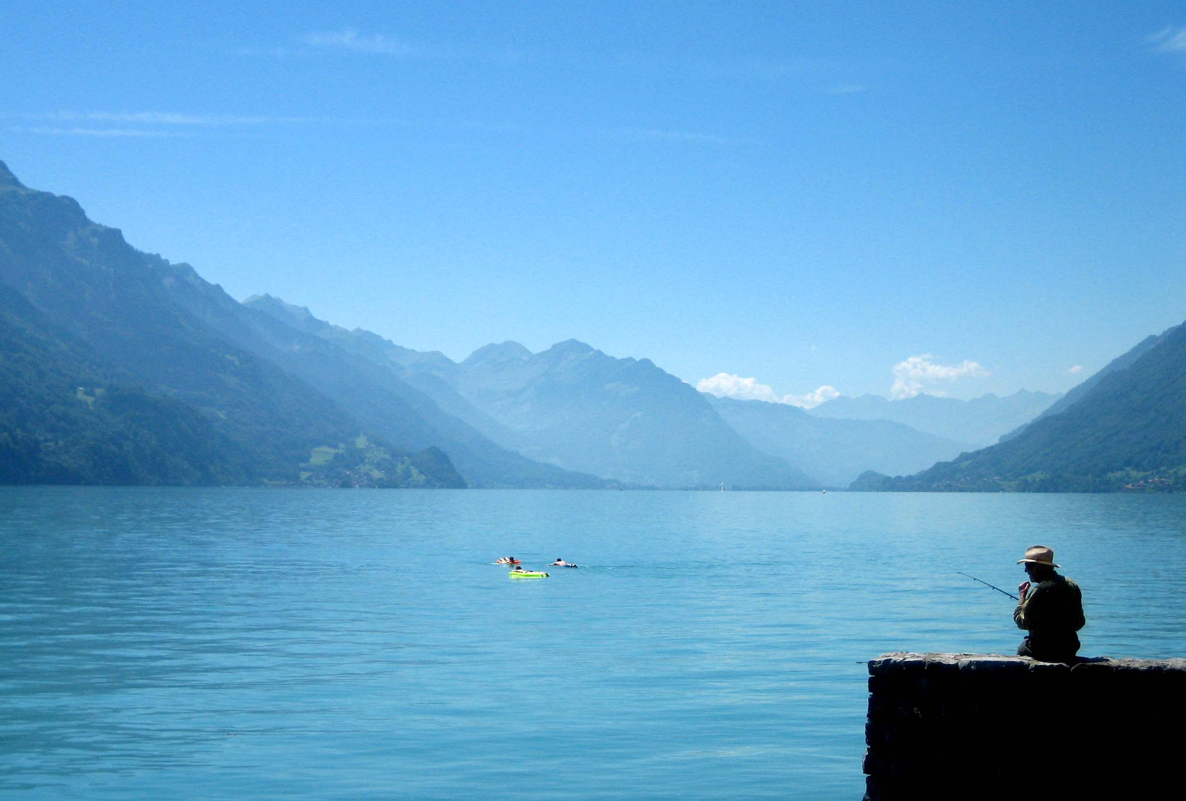 Brienzersee westwärts